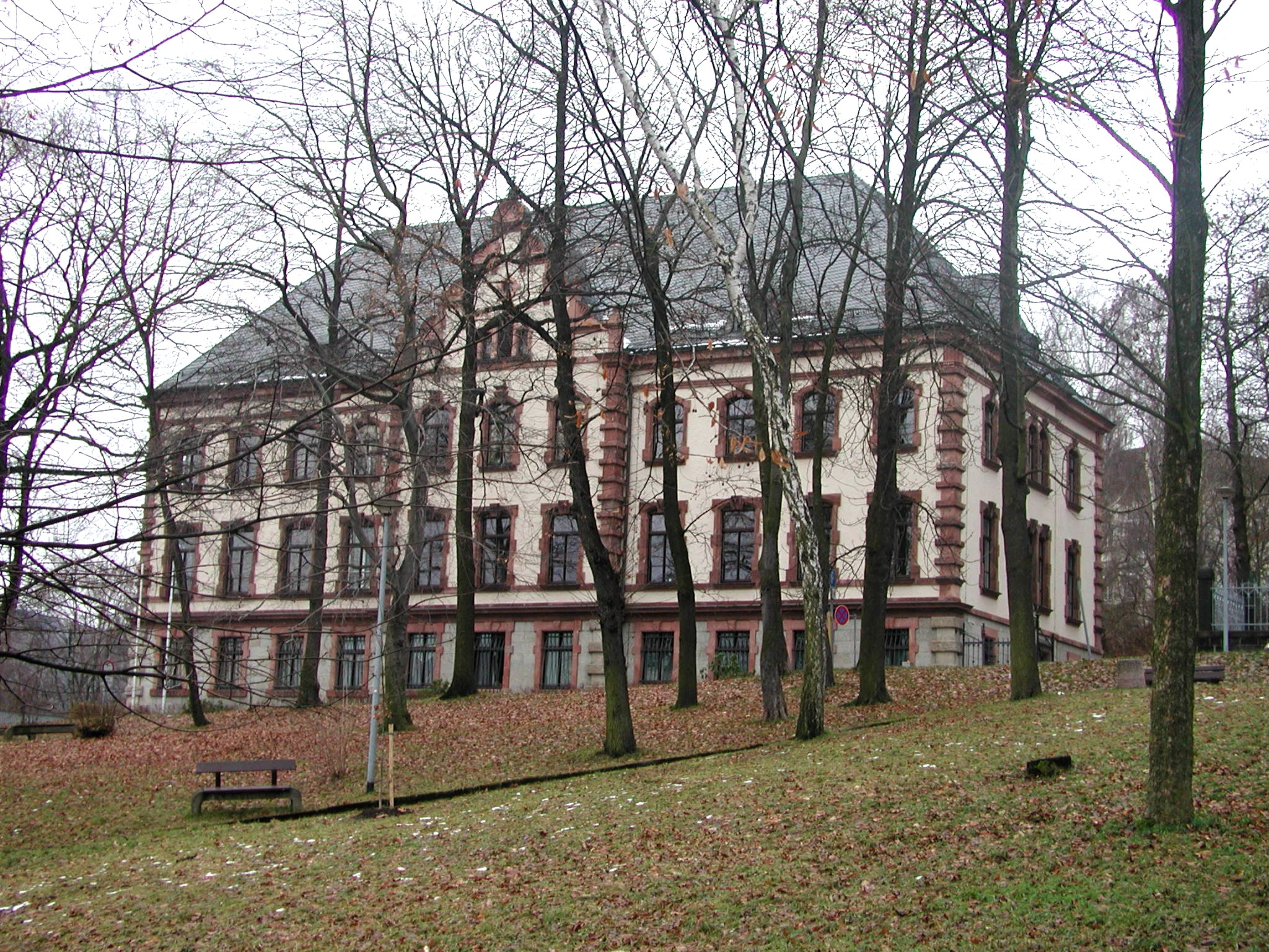 Das eh. Königliche Amtsgericht in Aue